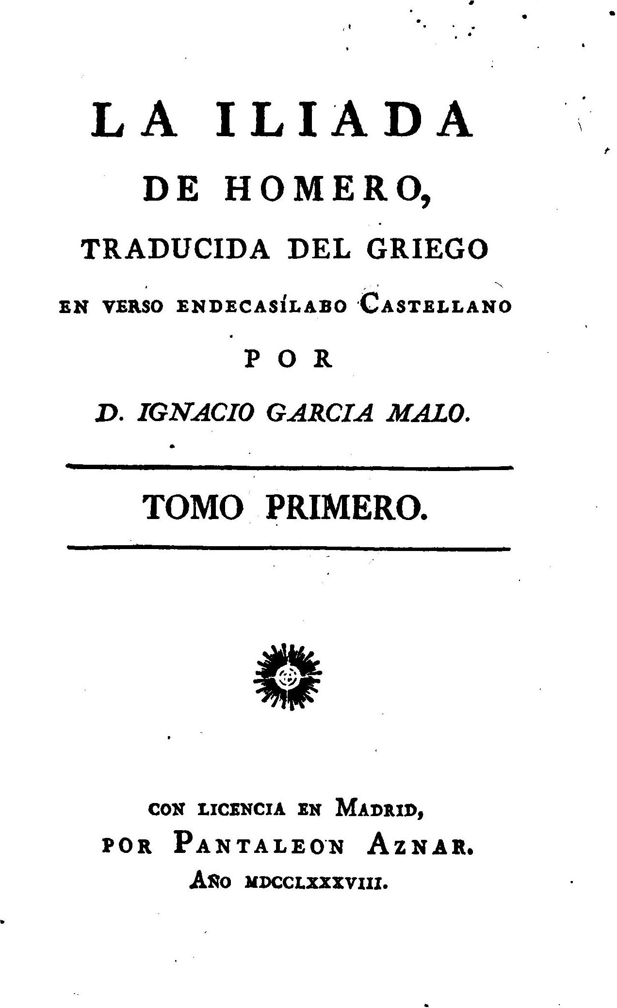 La Ilíada de Homero, Tomo I (Ignacio García Malo)